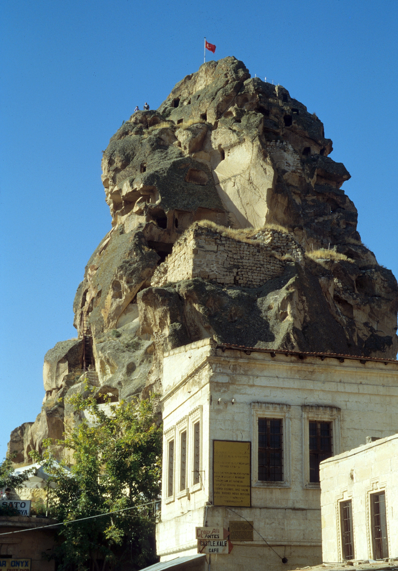 Burgberg von Ortahisar, Kappadokien, Zentraltürkei